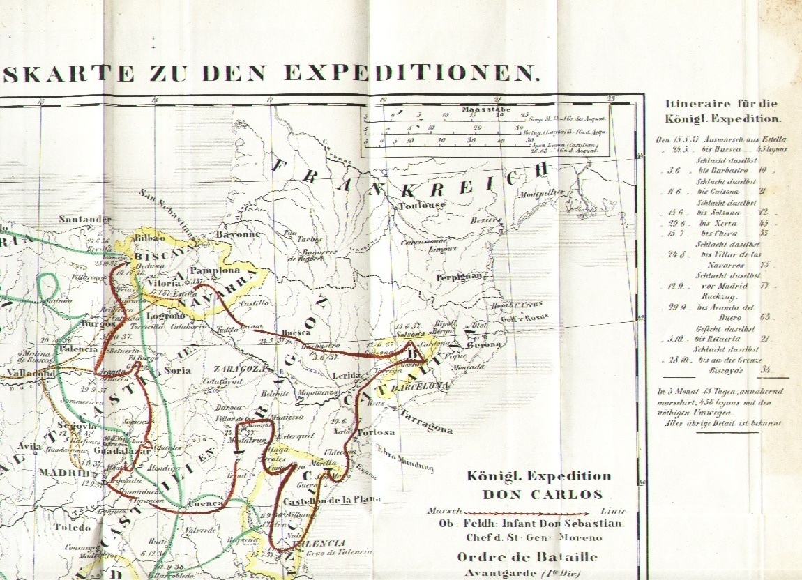 Mapa Rahden sobre Expedición Real - Grabado